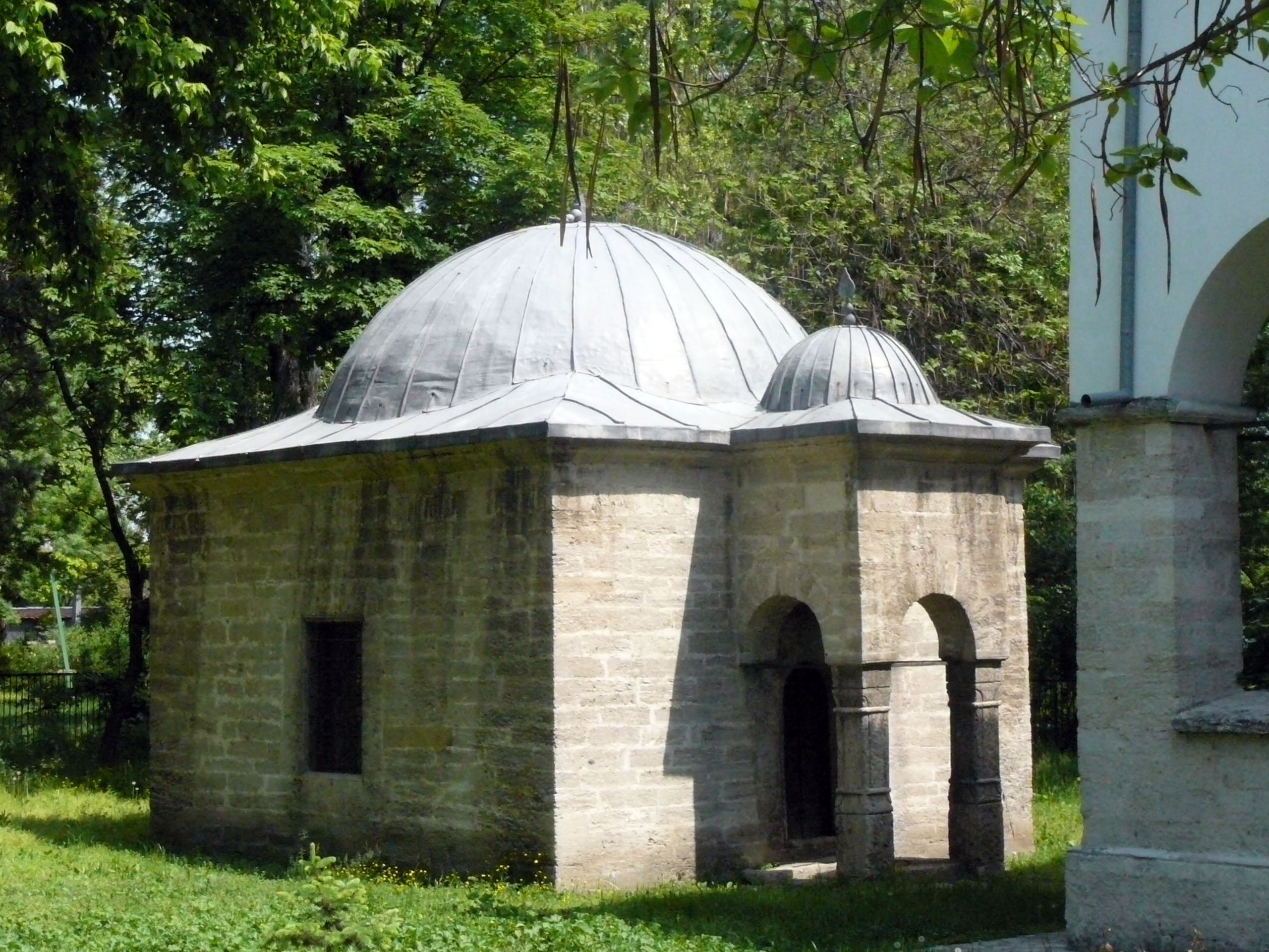 Vidin,Bulgaria; библиотеката на Осман Пазвантооглу